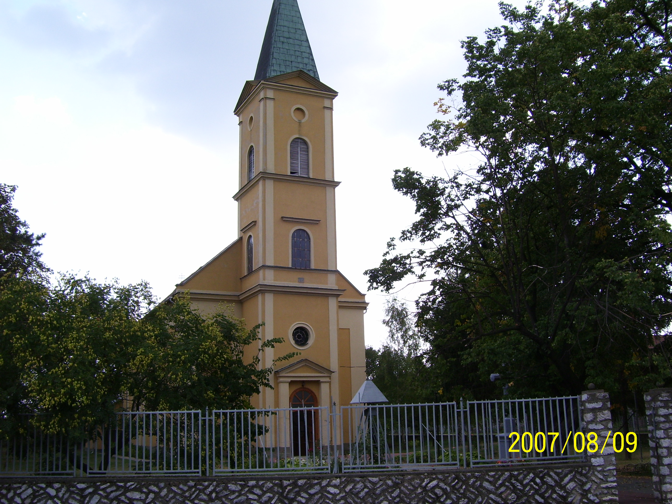 Szent Péter és Pál apostolok római katolikus templom, Tard